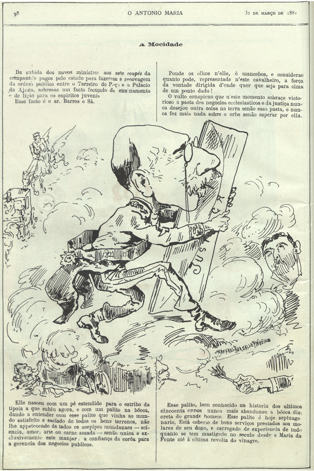 Barros e Sá caricaturado por Rafael Bordalo Pinheiro